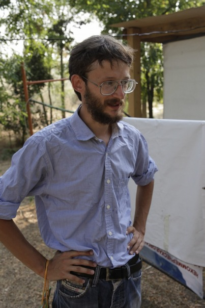 Станислав Дробышевский во время одной из экспедиций